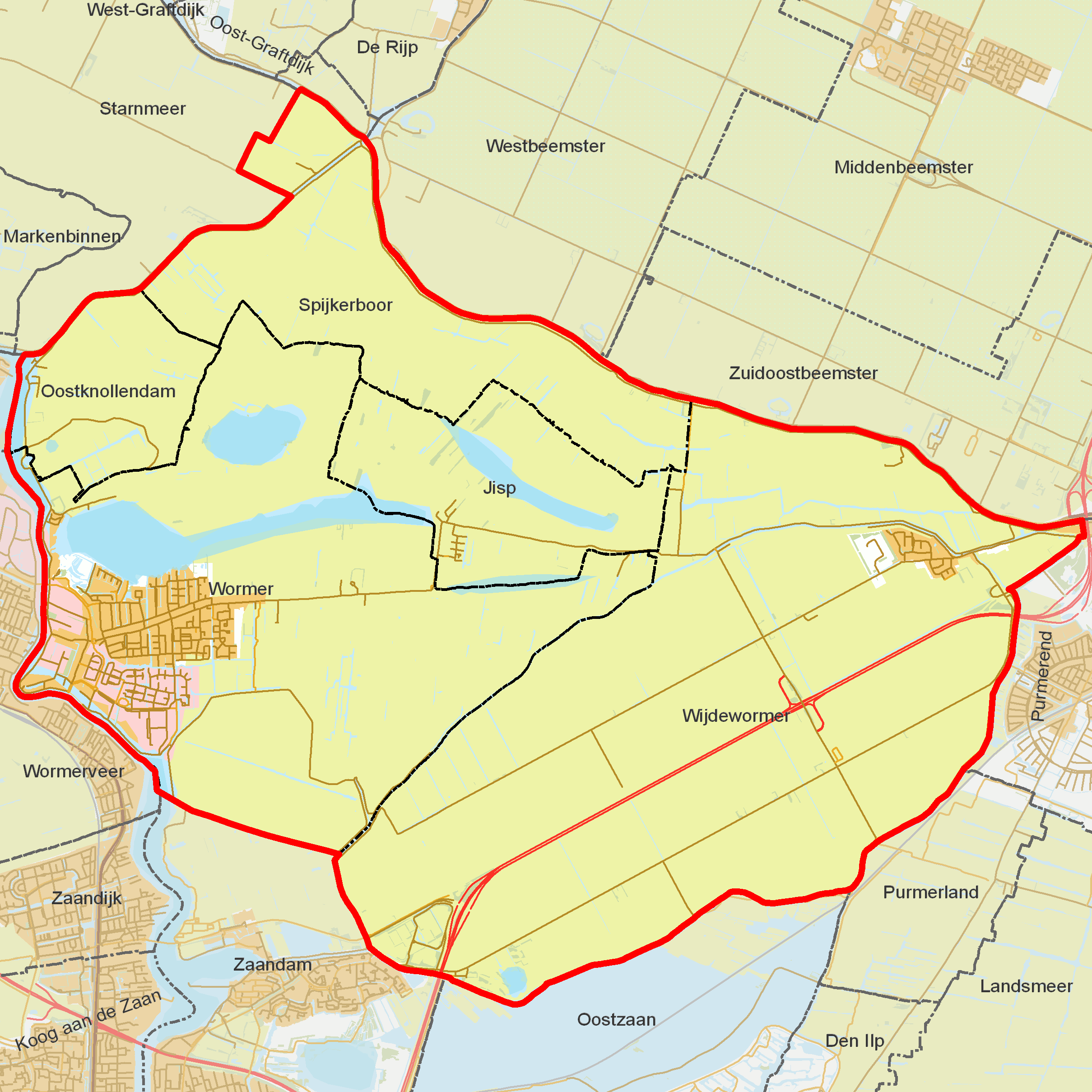 BAG woonplaatsen - Gemeente Wormerland.png